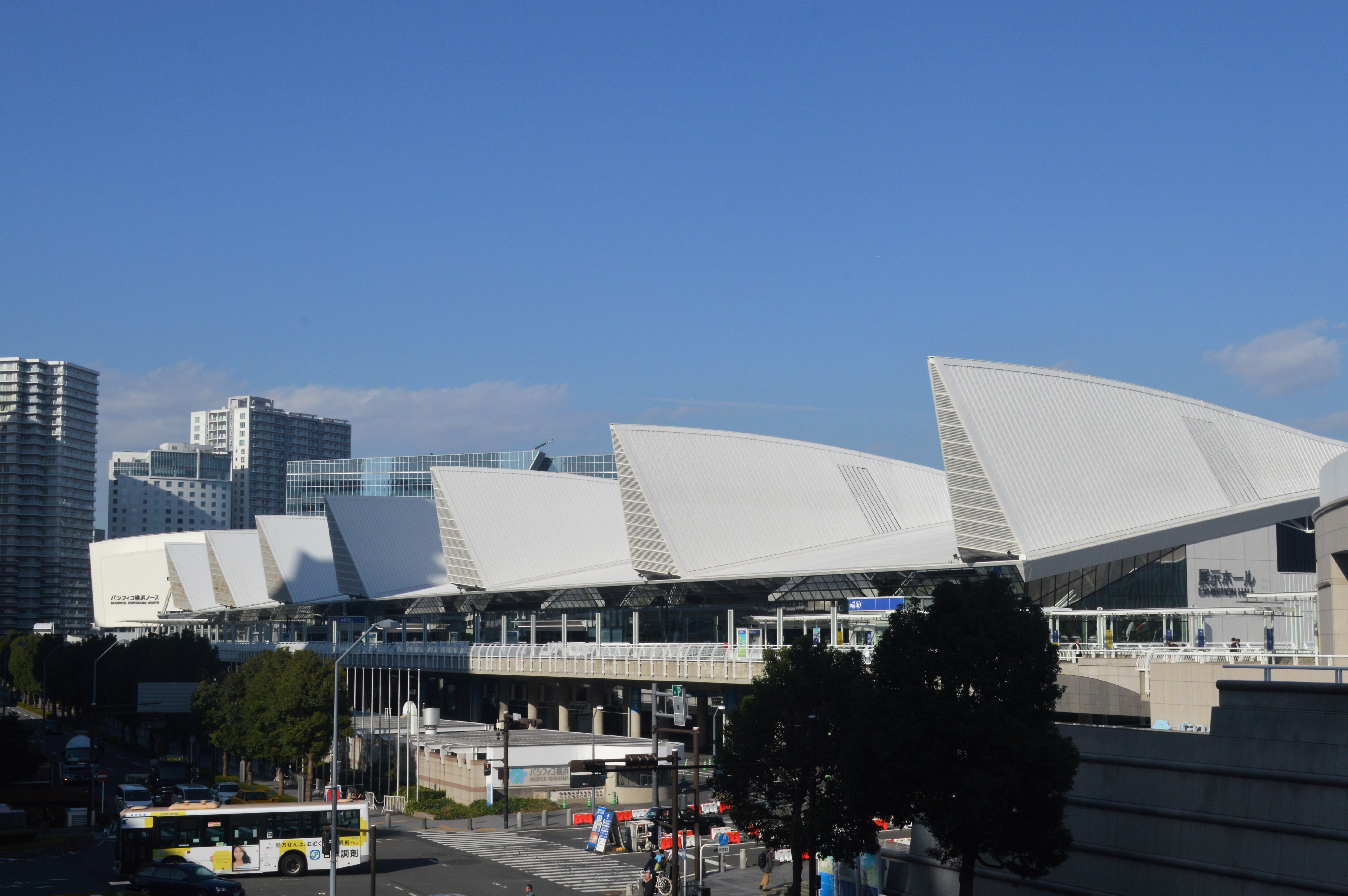 神奈川県横浜市西区にある横浜国際平和会議場（パシフィコ横浜）。